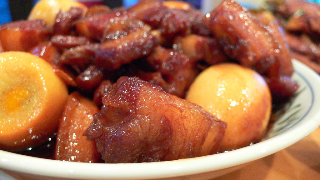 東坡肉